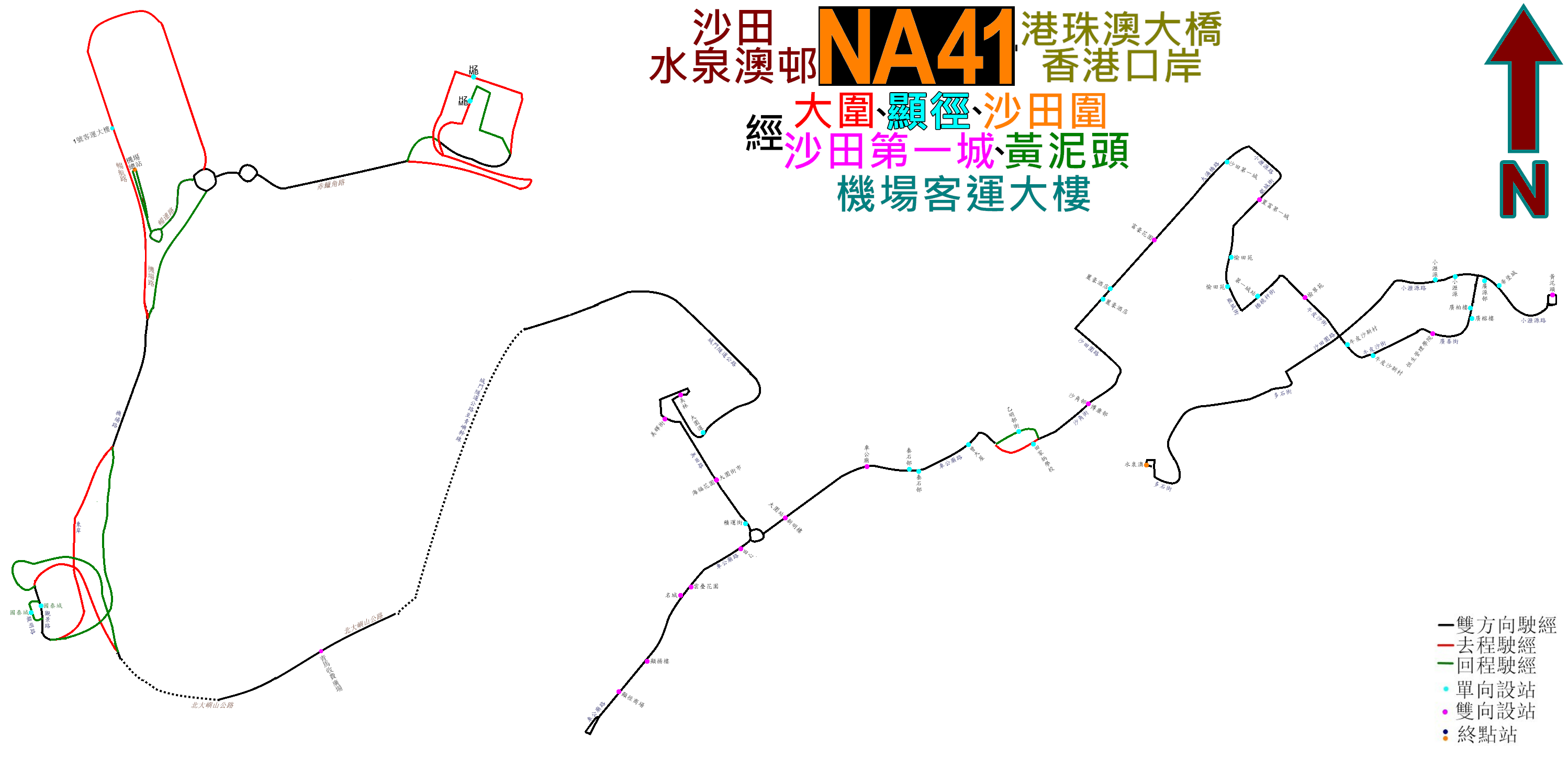 中文（香港）: 龍運巴士NA41線的走線圖